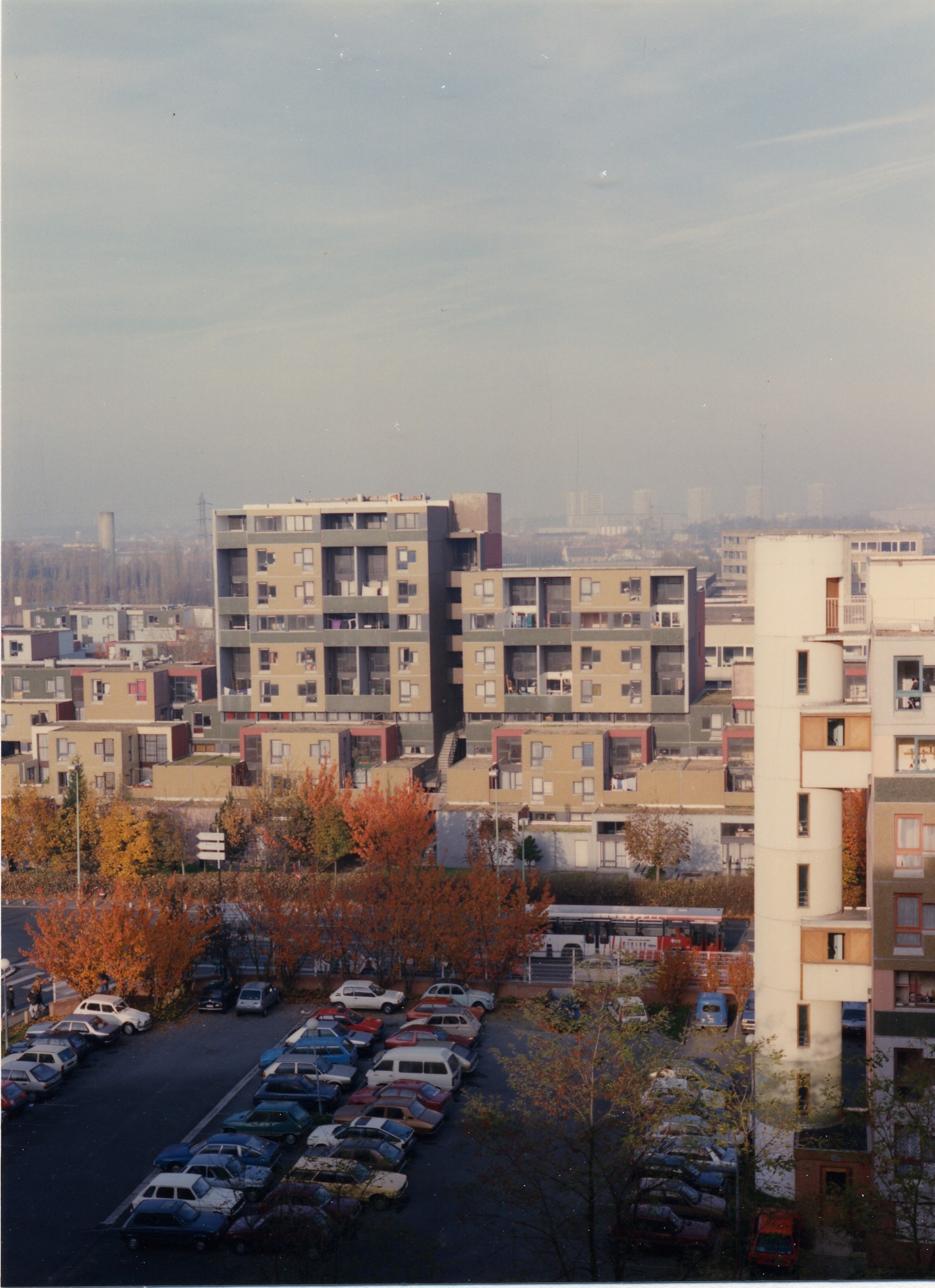 Quartier du Pont-de-Bois à Villeneuve d'Ascq en novembre 1988.